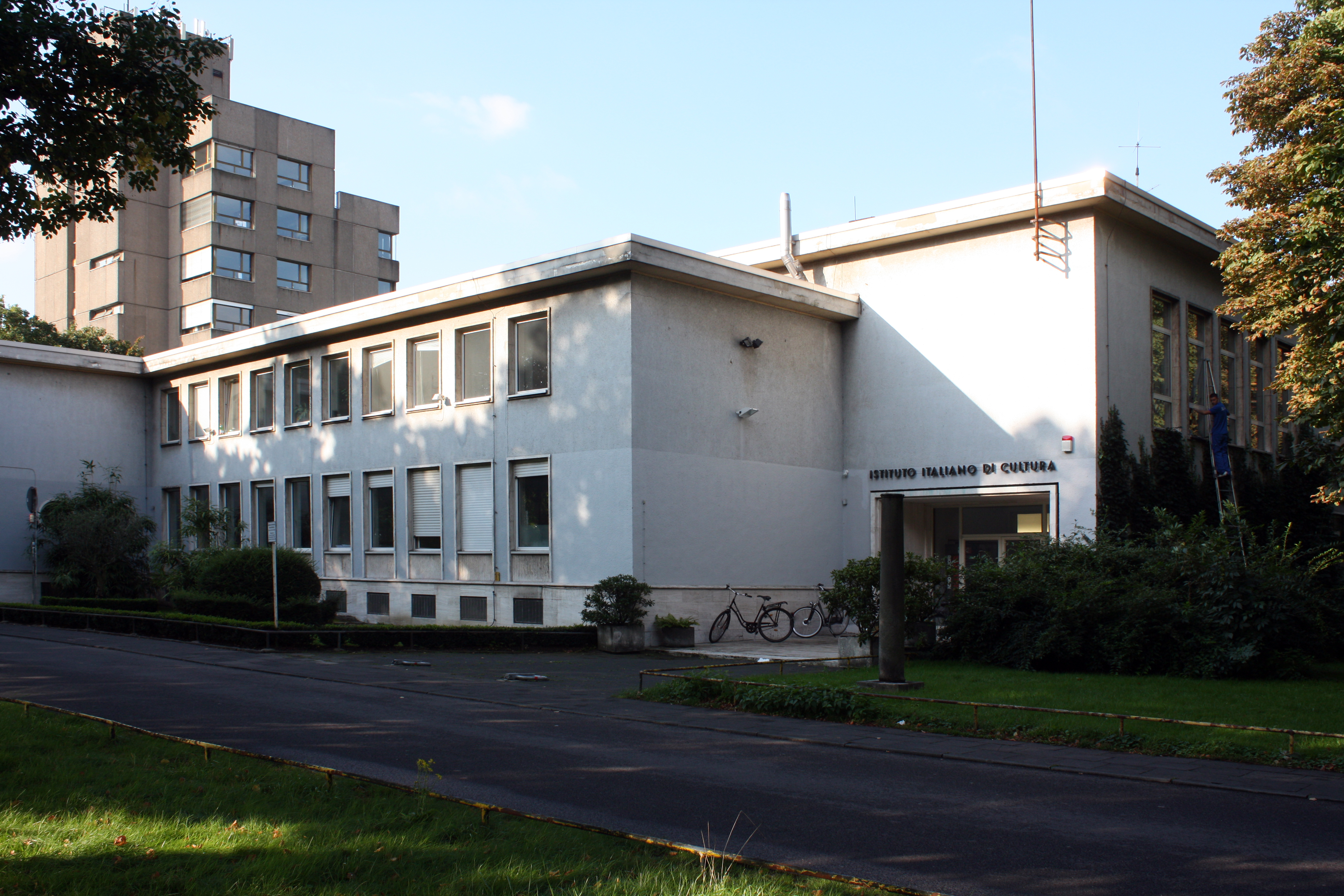 Italienisches Konsulat und Kulturinstitut, Köln